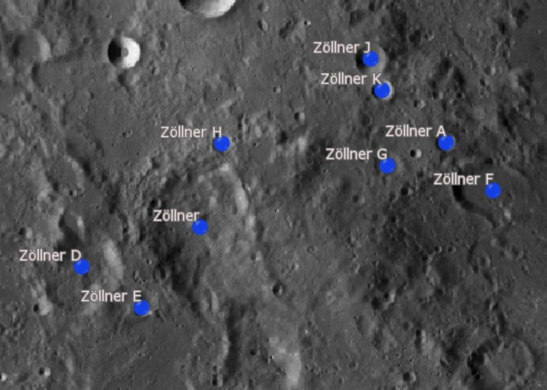 Cráter lunar Zöllner. Cráteres satélite. (Imagen LRO)